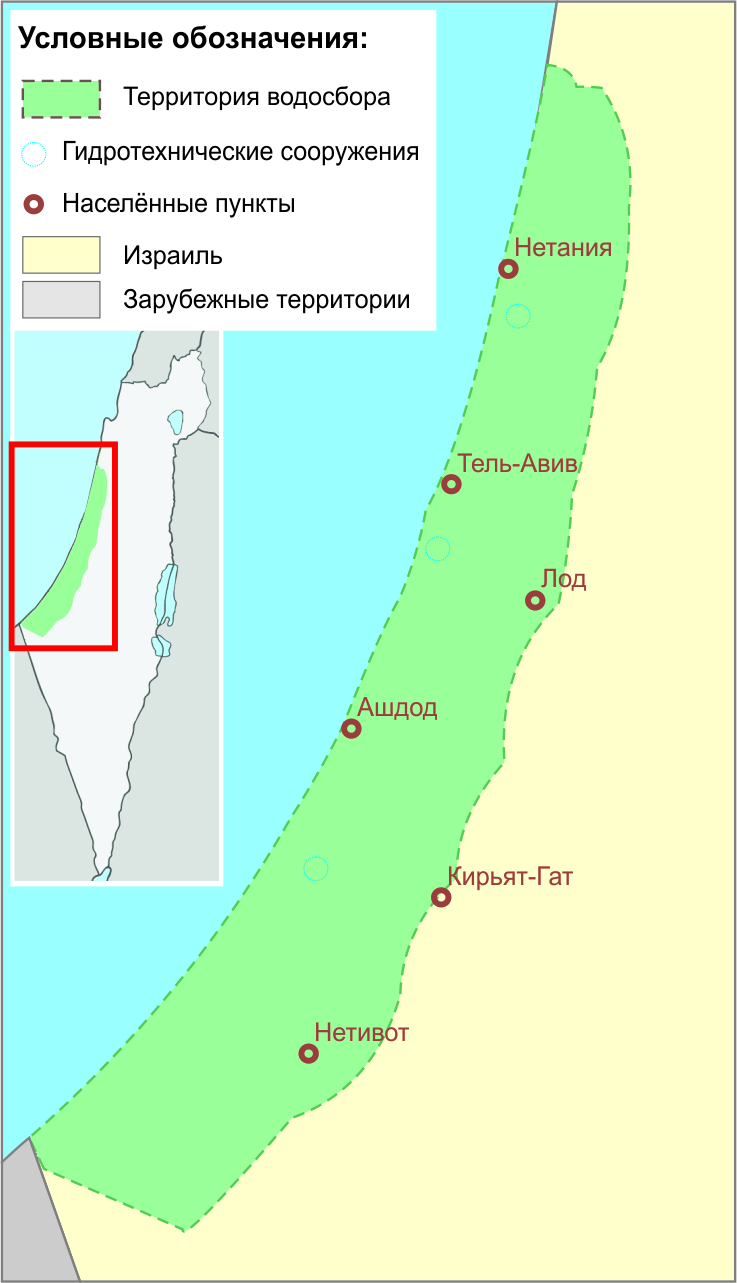 Карта водосборного прибрежного бассейна / водные ресурсы государства Израиль